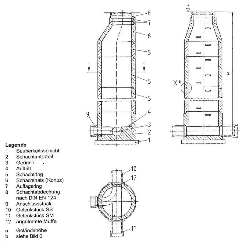 Schachtaufbau mit Beschreibungen der Aufbauteile